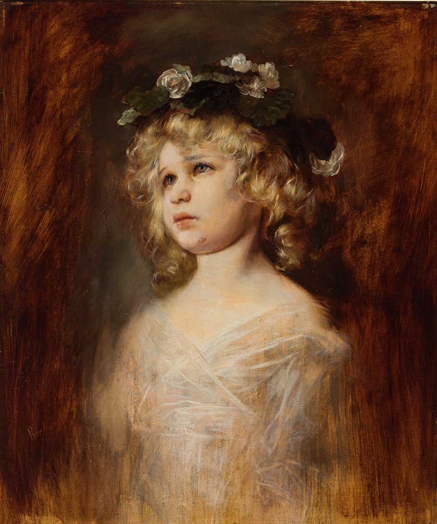 Zugeschr. Porträt eines kleinen Mädchens mit Blüten im lockigen blonden Haar. Öl/Ktn. 59 x 49 cm. Eine Studie zu dem Bild: Studie